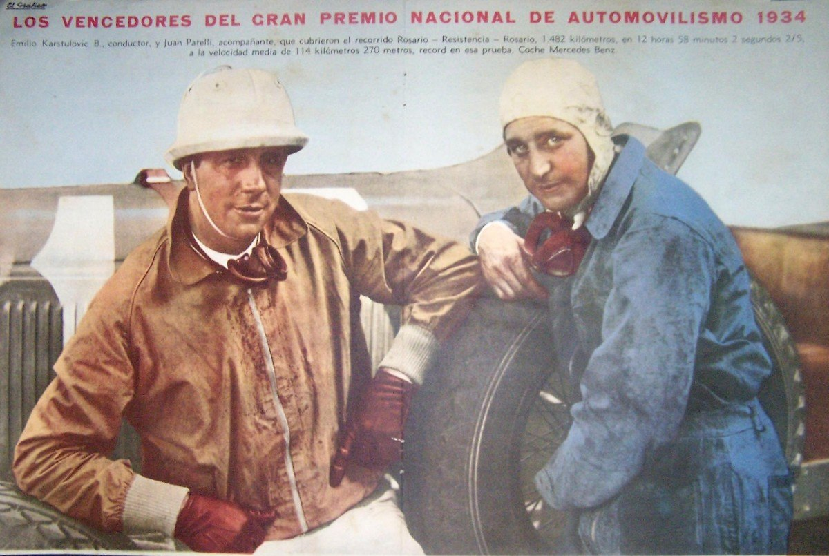 El piloto Emilio Kartulovich y su acompañante Juan Paccini, ganadores del Gran Premio Argentino de Carretera 1934, con Mercedes-Benz. Revista El Gráfico.